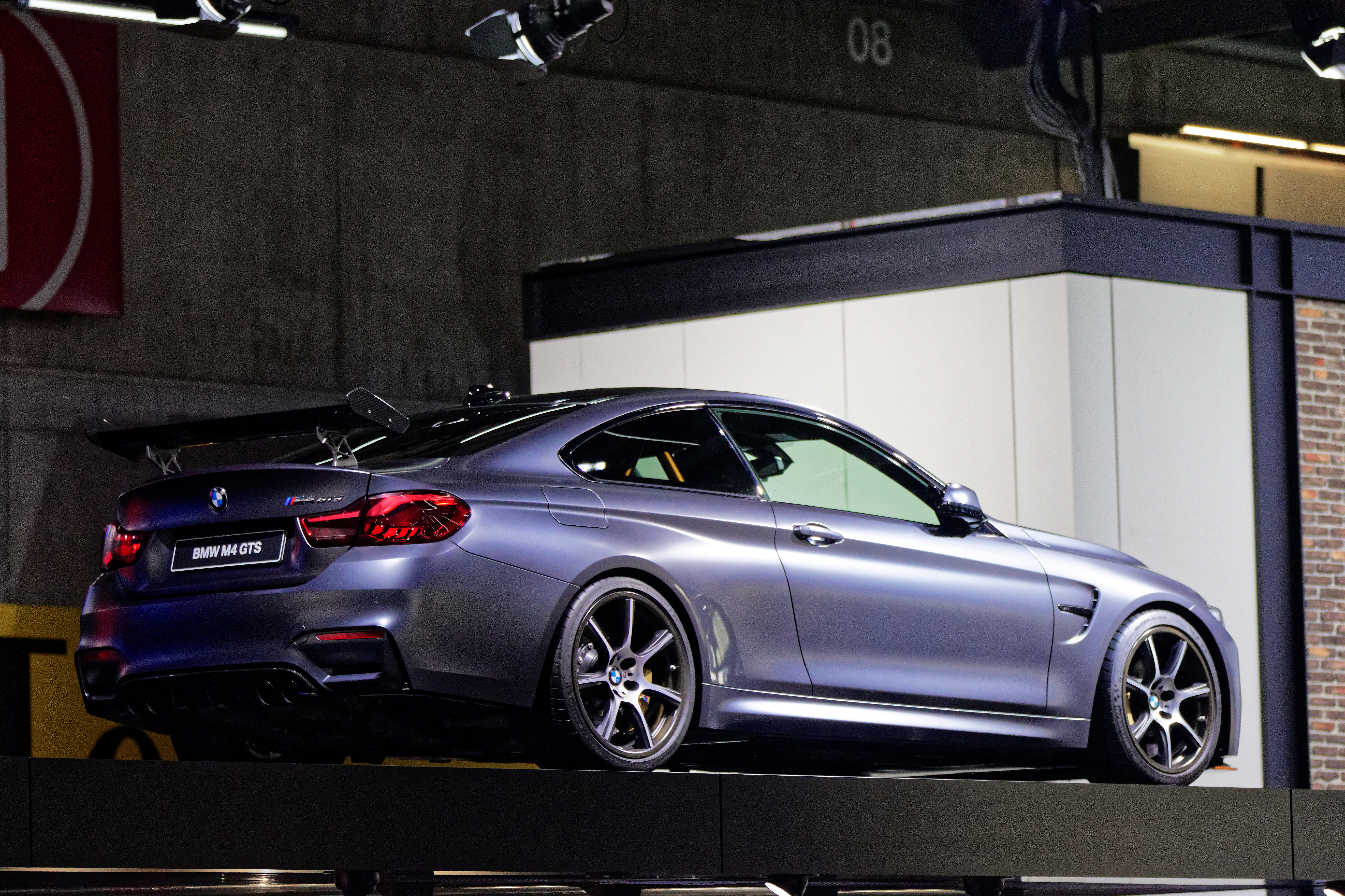 Une BMW M4 GTS présentée lors du mondial de l'automobile de Paris 2016.